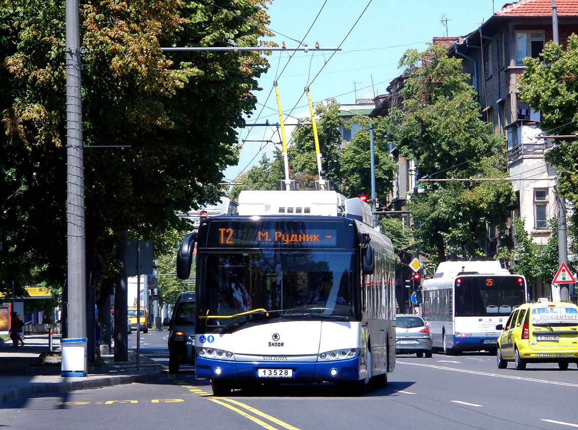 Škoda 26Tr Solaris в Бургас